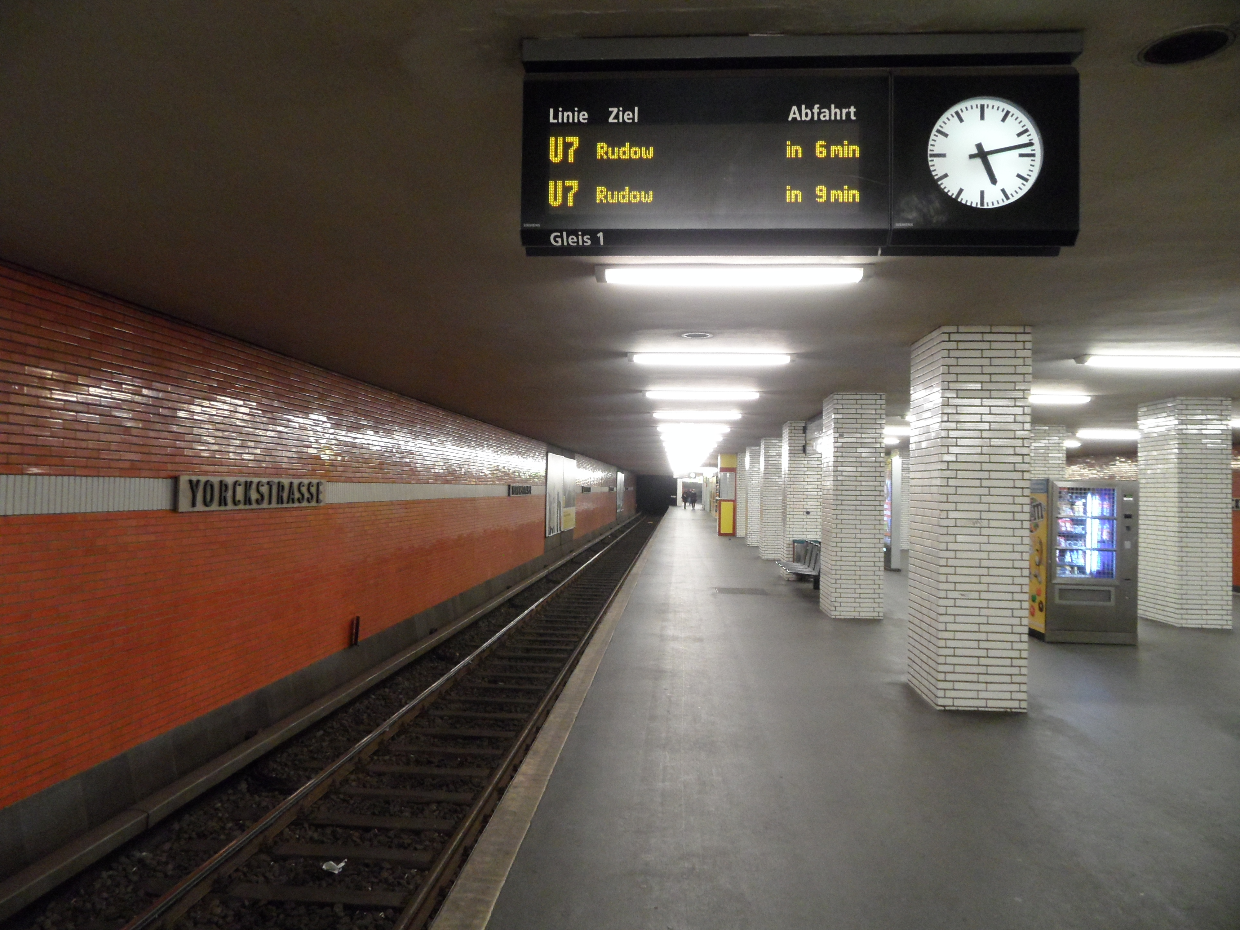 Berlin - U-Bahnhof Yorckstraße - Linie U7